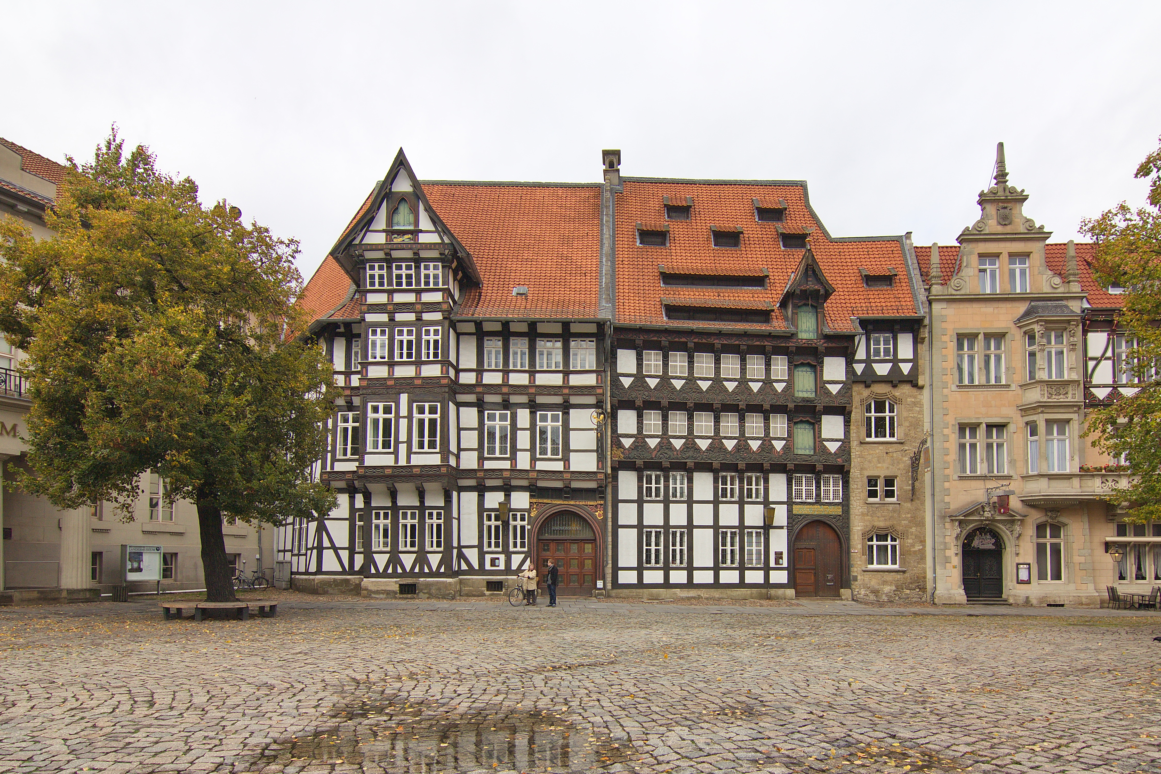 Das Huneborstelsche Haus, das heutige Gildehaus, ist ein Fachwerkhaus aus dem Jahre 1524 am Burgplatz in Braunschweig. Charakteristisch ist sein reich gestalteter Figurenfries des Braunschweiger Holzbildhauers Simon Stappen. Links davon das Von Veltheimsche Haus auf der Nordseite des Burgplatzes in Braunschweig ist ein Fachwerkhaus aus dem Jahre 1573.